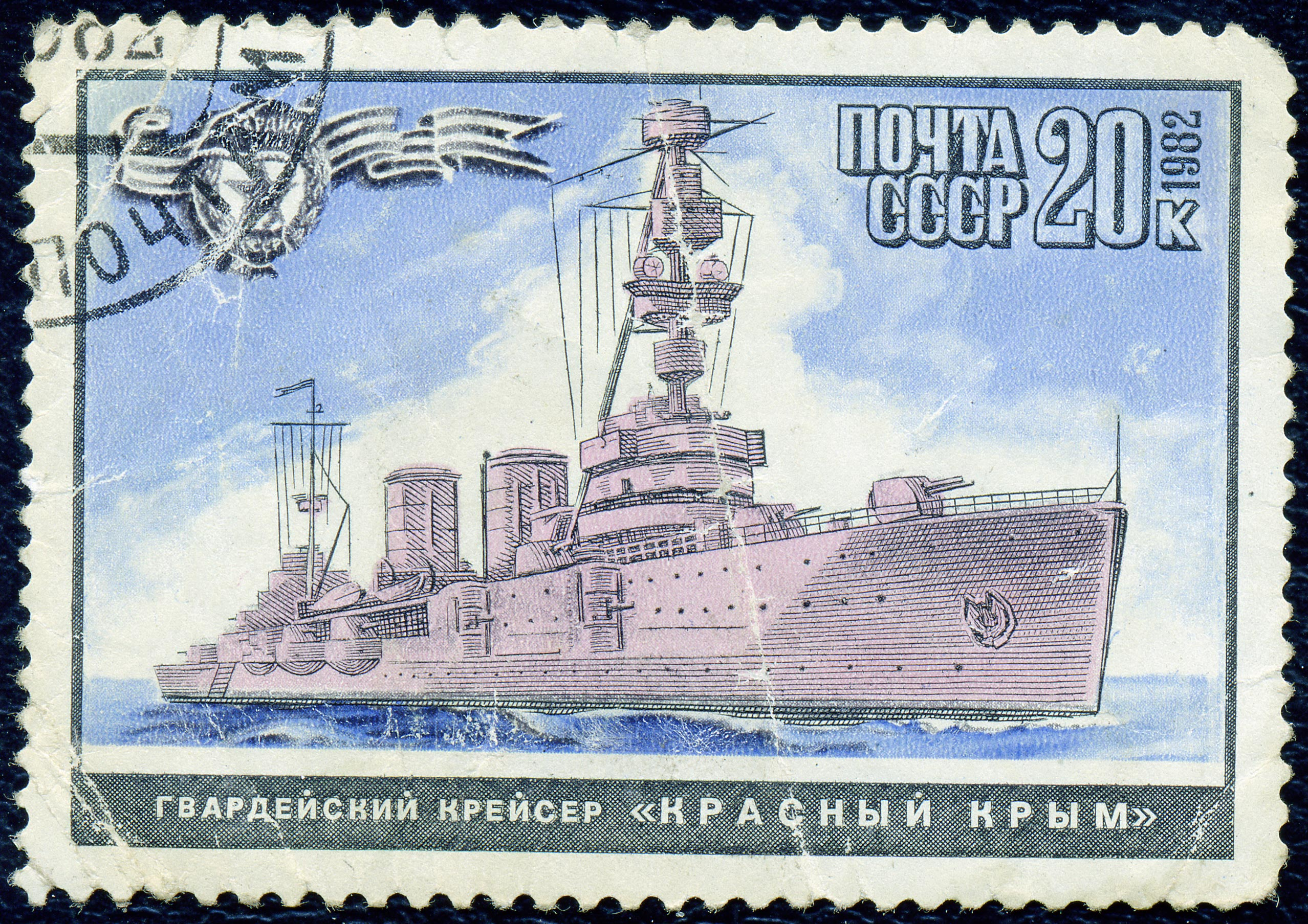 Почтовая марка СССР. 1982. Гвардейский крейсер Красный Крым CPA # 5337